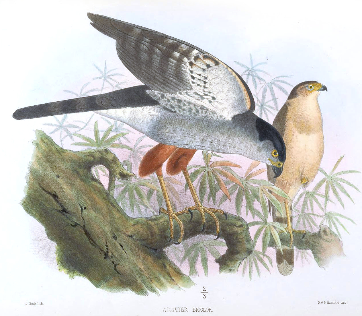 Accipiter bicolor